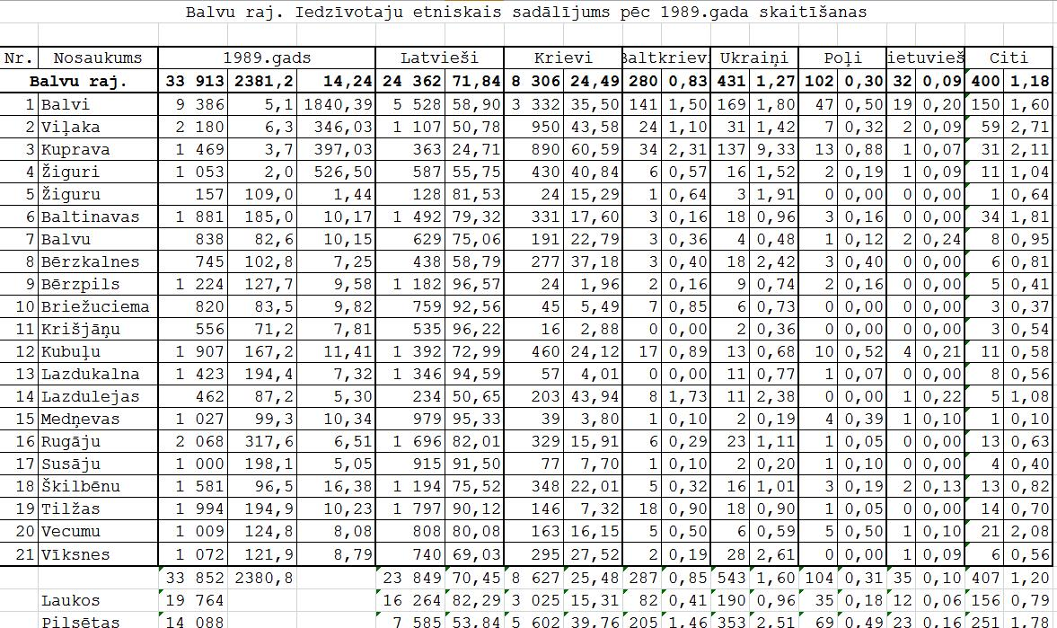 Этнический состав населения Латвии по переписи 1989 года